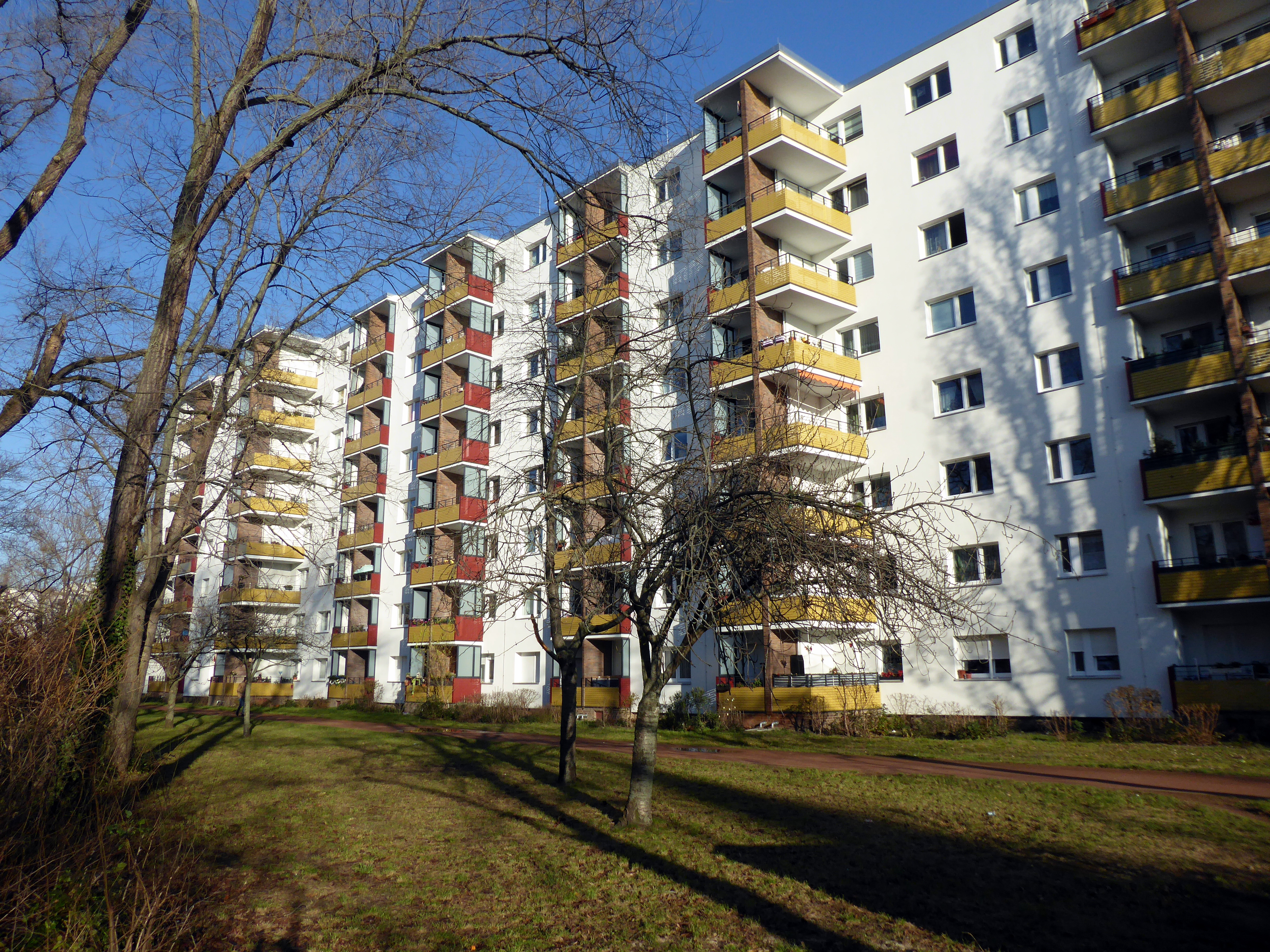 Berlin-Kreuzberg Alexandrinenstraße Otto-Suhr-Siedlung